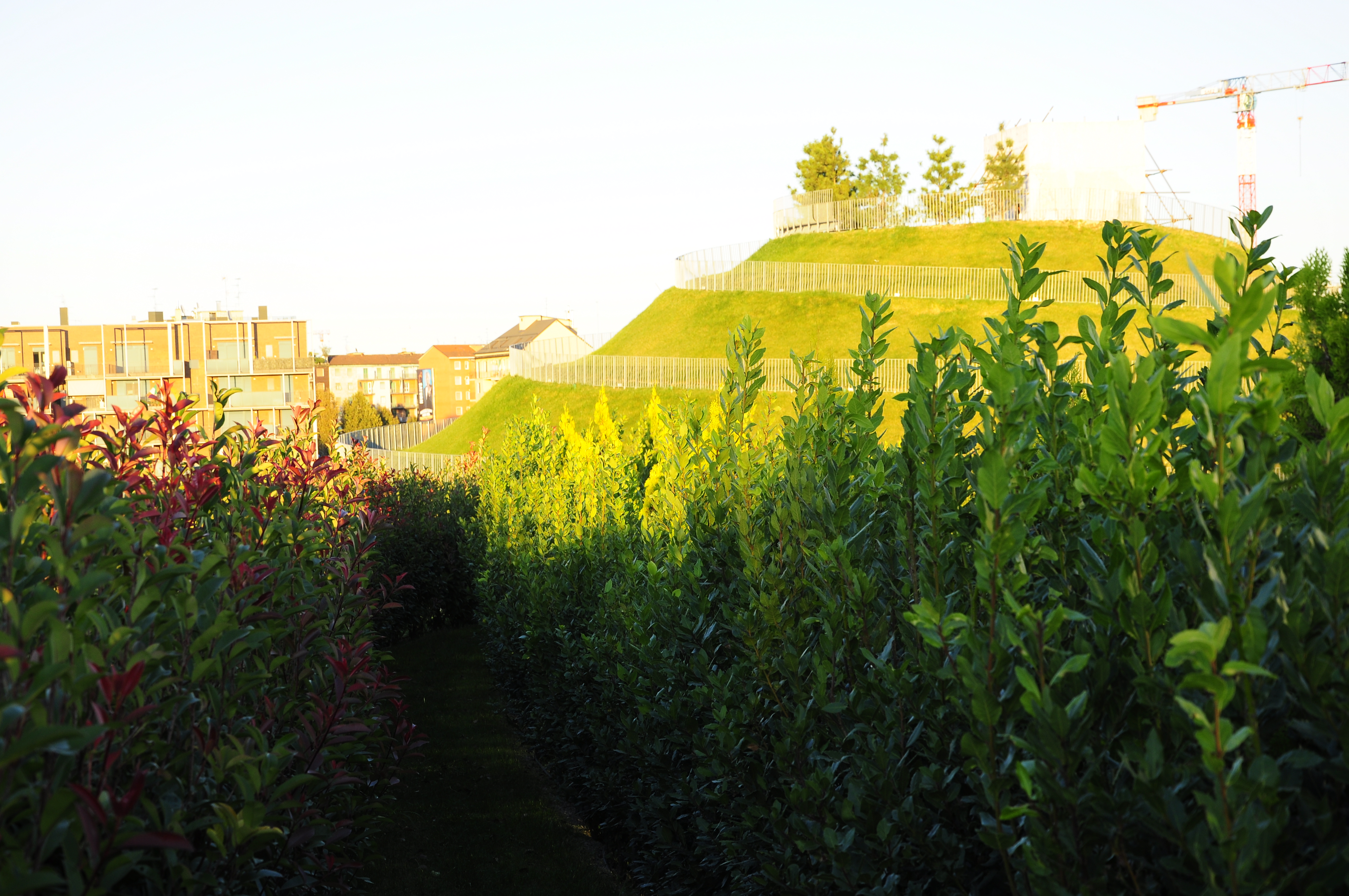 Collina del parco e vegetazione.